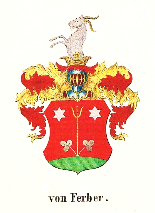 Wappen der mecklenburgischen von Ferber.